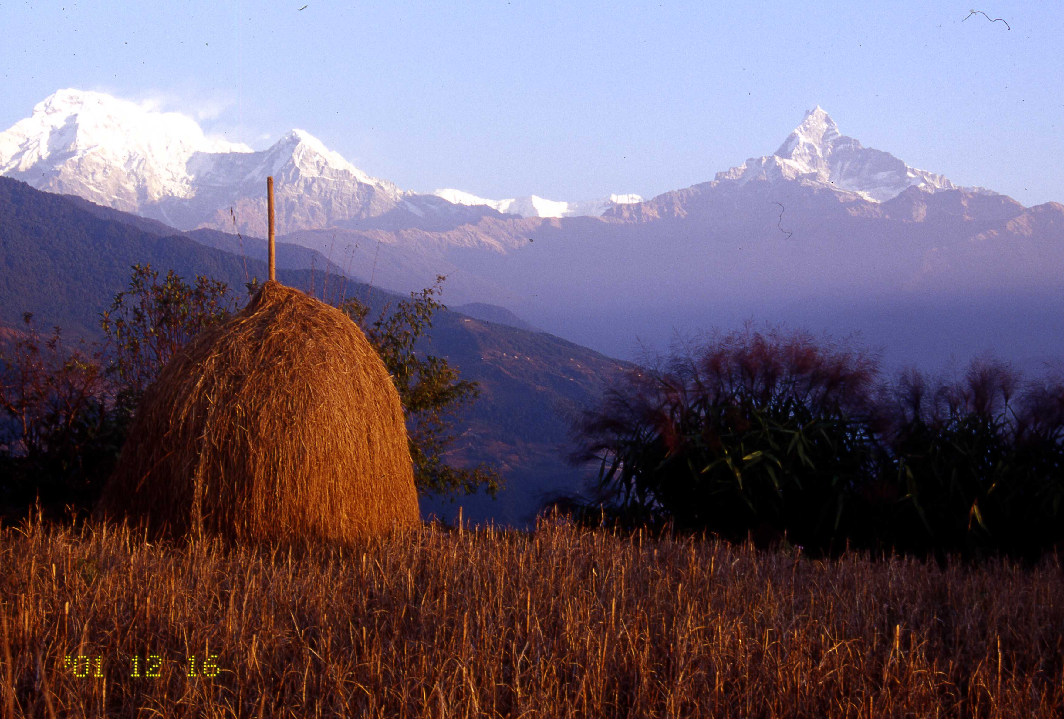 アンナプルナⅢ、マチャプチャレ ～photo by Autumn Snake 【おぉたむ すねィく探検隊】写真部門 担当 大原佳苗